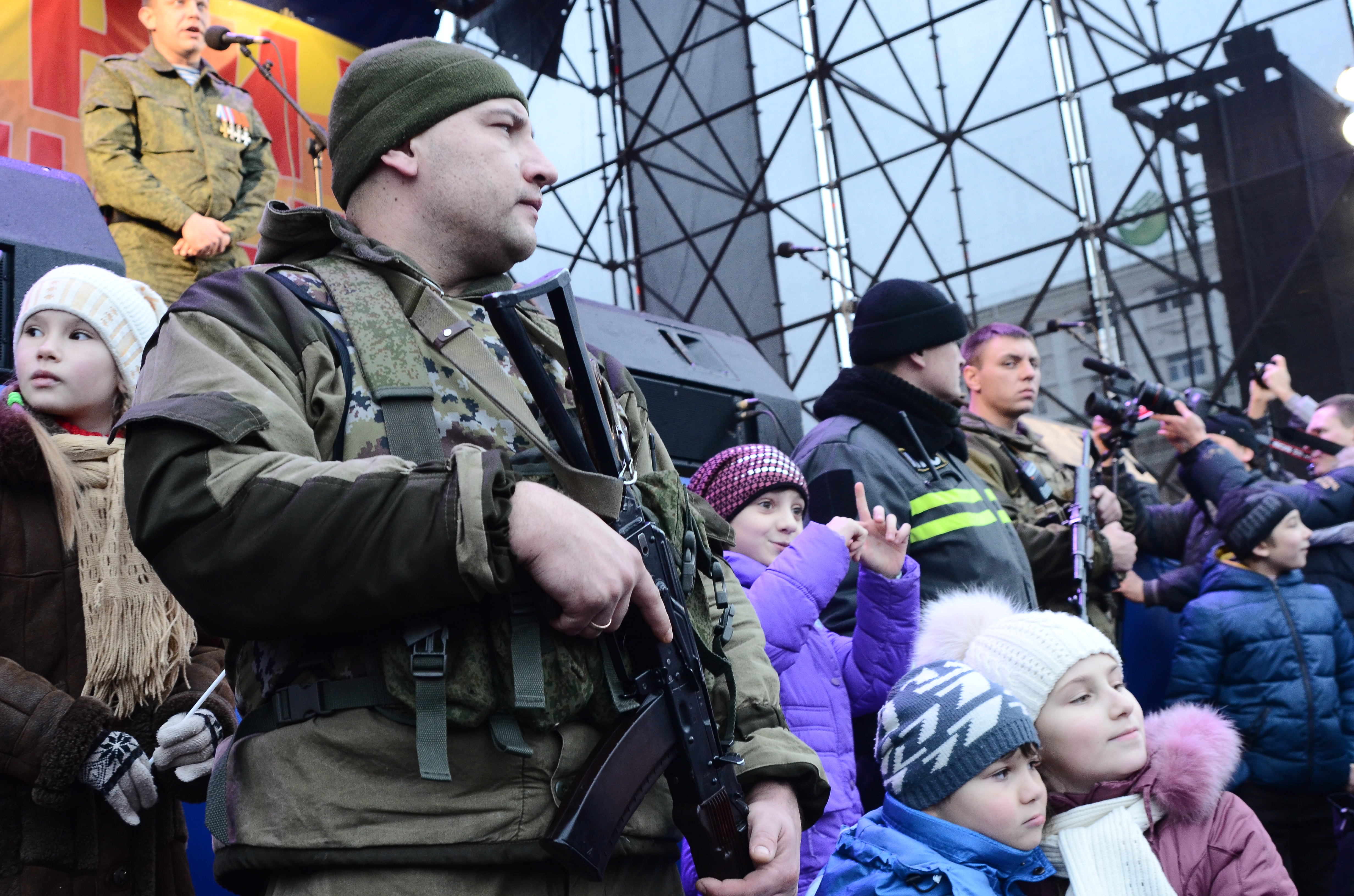 Праздник солидарности в Донецке